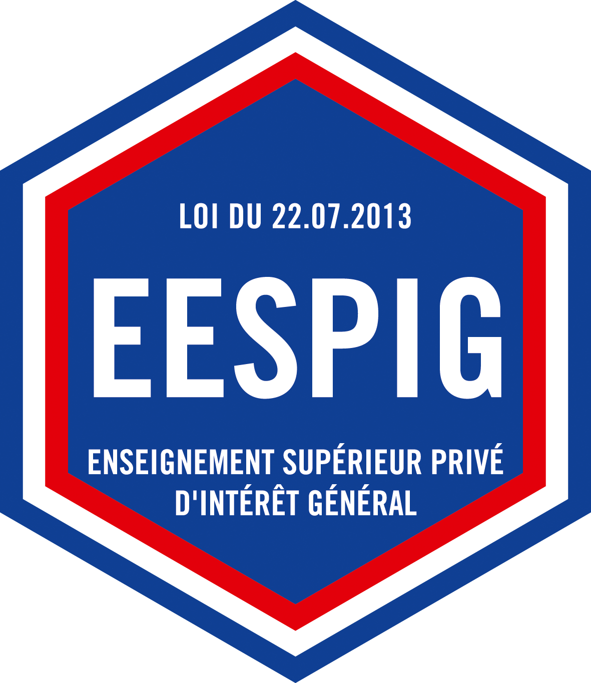 Label EESPIG - Ministère de l'Enseignement Supérieur, de la Recherche et de l'Innovation (France)